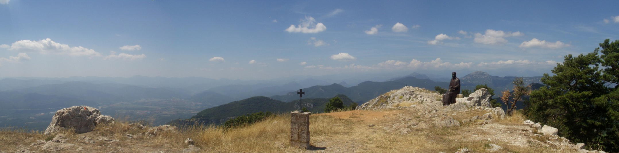 Monument dedicat a Jacinto Verdaguer a la Mare de Déu del Mont (Sculptor:Joan Ferrés i Curós, 2008)